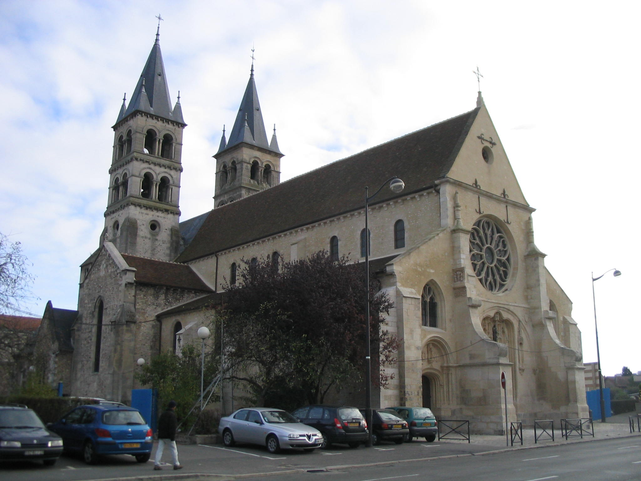 La collégiale Notre Dame de Melun, dans l'ile Saint-Etienne, à Melun.